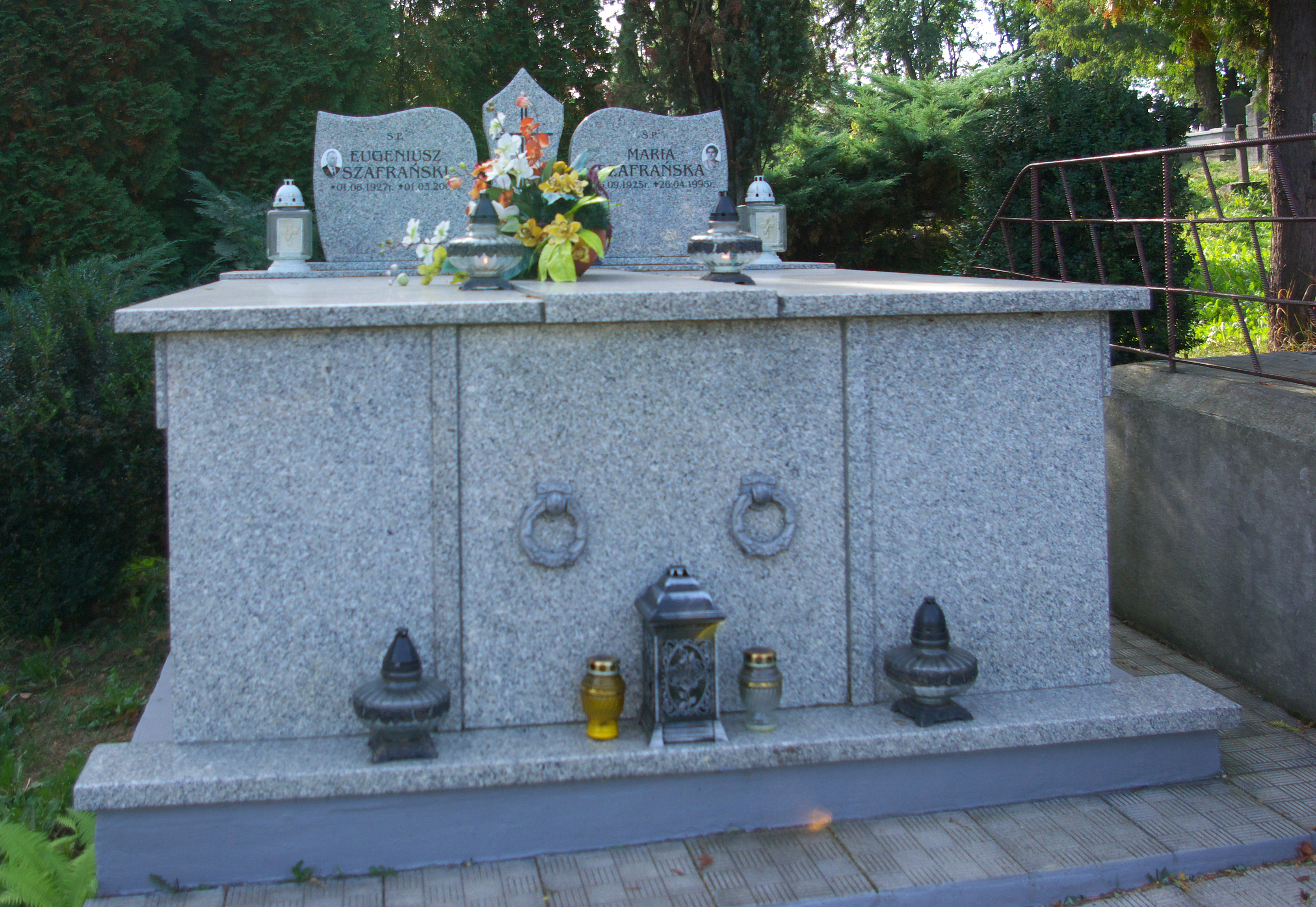 Grobowiec Eugeniusza i Marii Szafrańskich na Cmentarzu Centralnym w Sanoku.